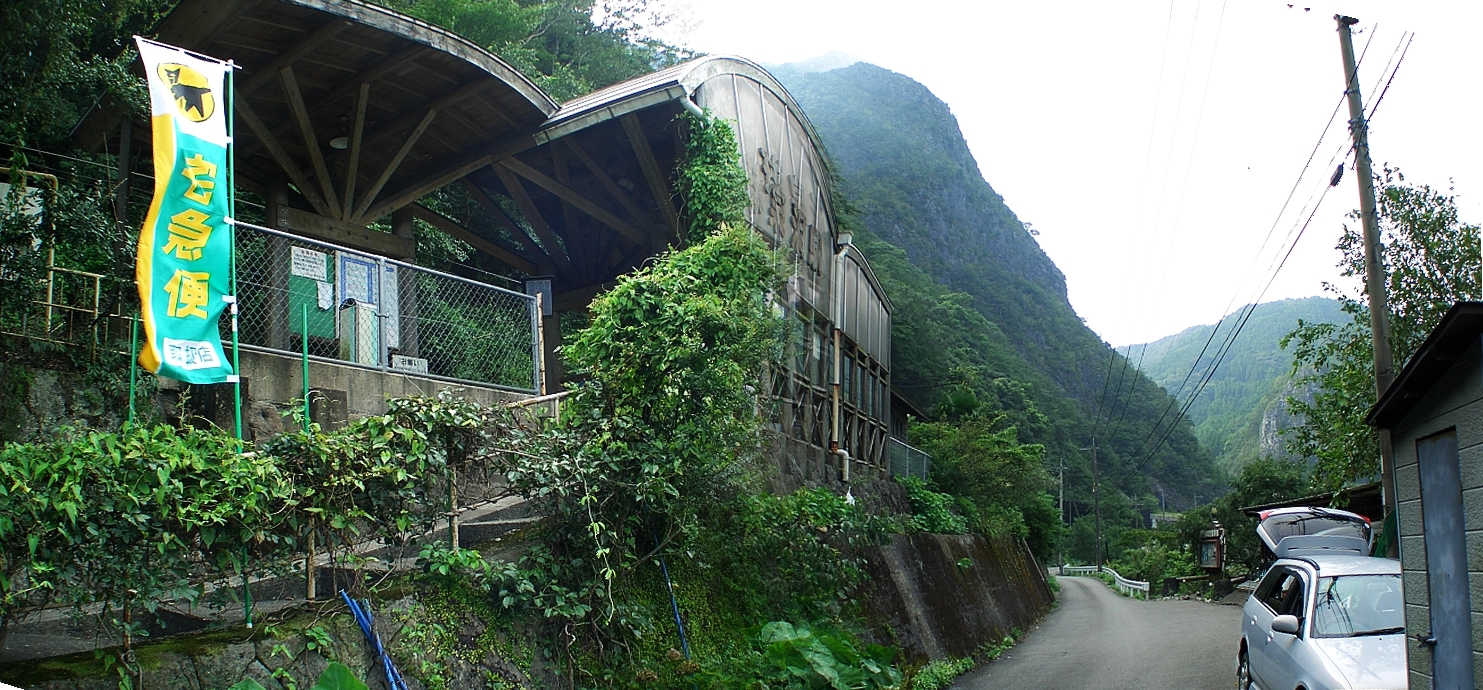 撮影：takasunrise0921